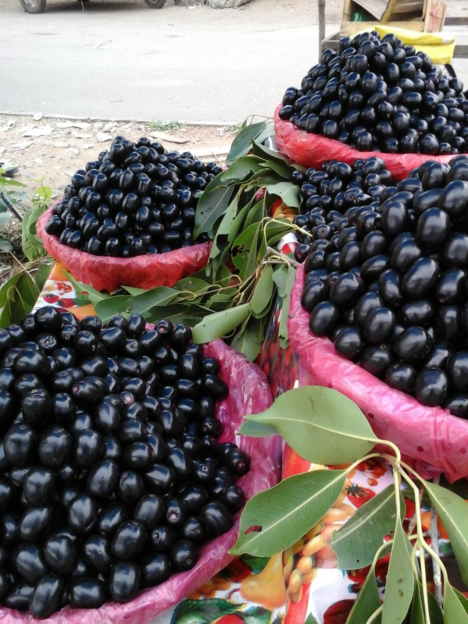 neredu or syzygium cumini being put up in baskets for sale.